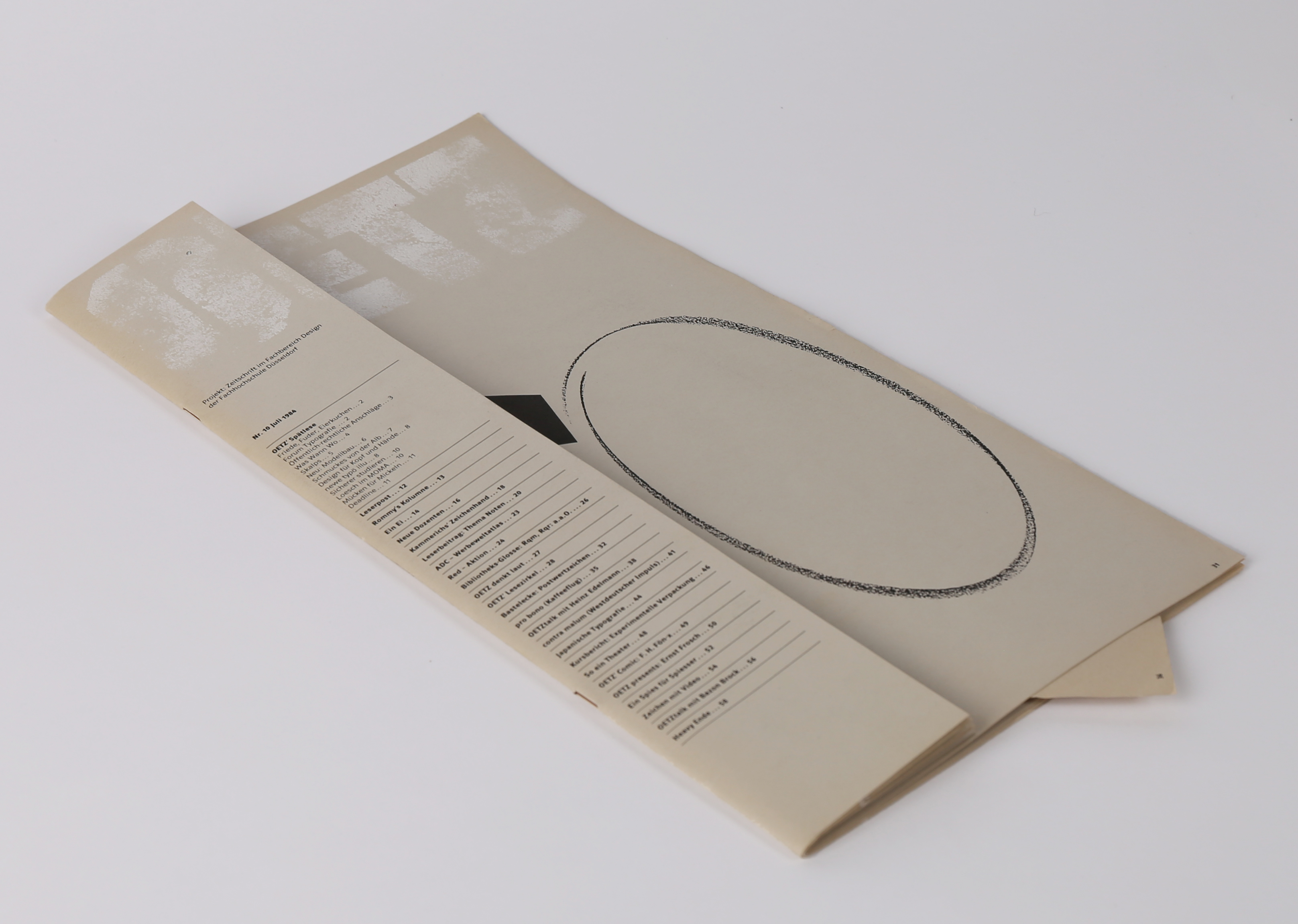 Titelseite der Ausgabe 10 mit verkürzten Seiten und zusätzlicher Sonderfalz im Mittelteil auf Seite 35, 36 im Artikel pro bono.